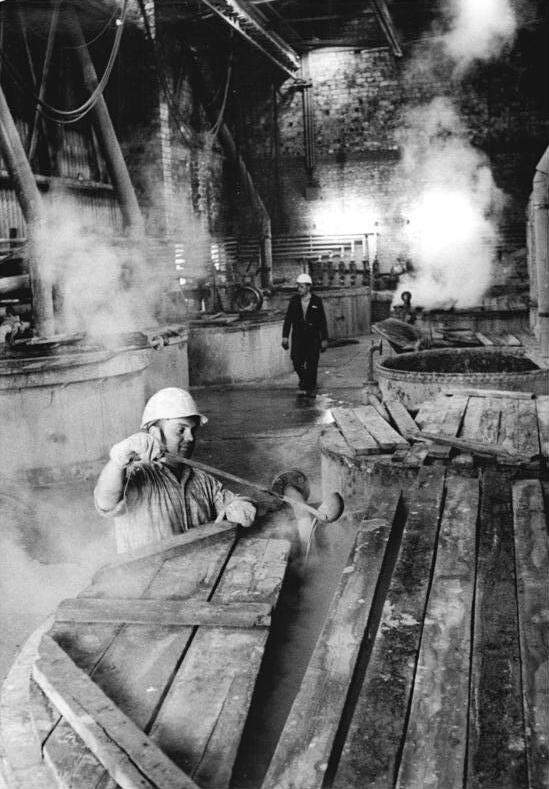 Für Bezieher des ADN-Reportagedienstes! Zum Beitrag: Knobeln um Schrott und Türme - Ein "Verfahren für fehlende Eisenbahnschwellen" ADN-ZB-Kaufhold-6.6.1980-ha. Blick in die Abteilung "Eisenoxidgelb" des VEB Kali-Chemie Berlin, Stammwerk des Kombinats Farben und Lacke. In diesen großen Bottichen befinden sich die ausrangierten, alten und zerkleinerten Eisenbahnschwellen, aus denen hier Farbkörper hergestellt werden. Da es bald solche Bahnschwellen nicht mehr geben wird, muß man sich etwas anderes einfallen lassen. Türme für die Verarbeitung von Eisenspänen u.a. sind entwickelt und patentiert. Sie werde in den nächsten Jahren Schritt für Schritt eingeführt. (Beachten Sie hierzu auch W 0606-326-328 N)"